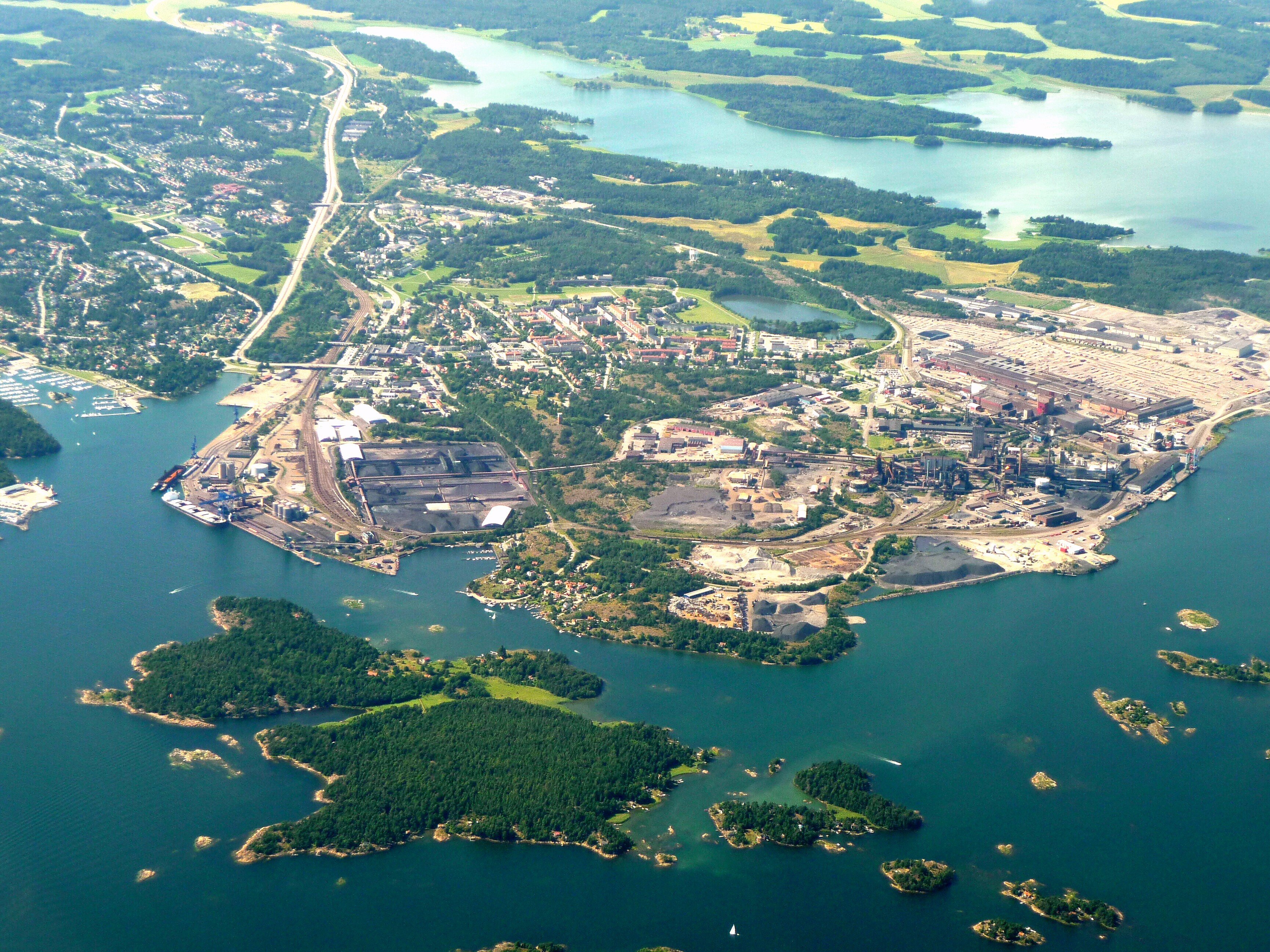 Oxelösund luftbild